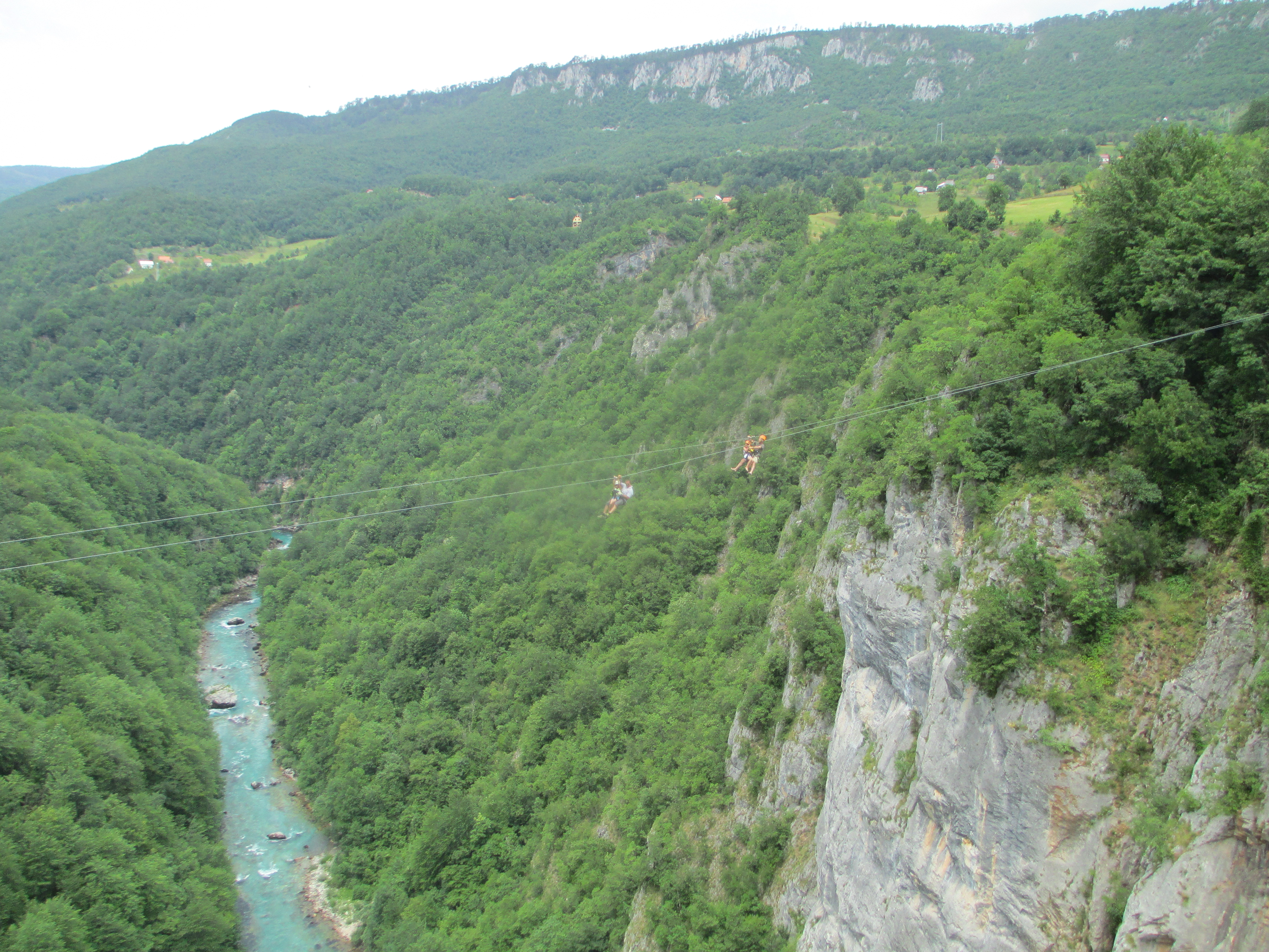 קניון נהר טארה